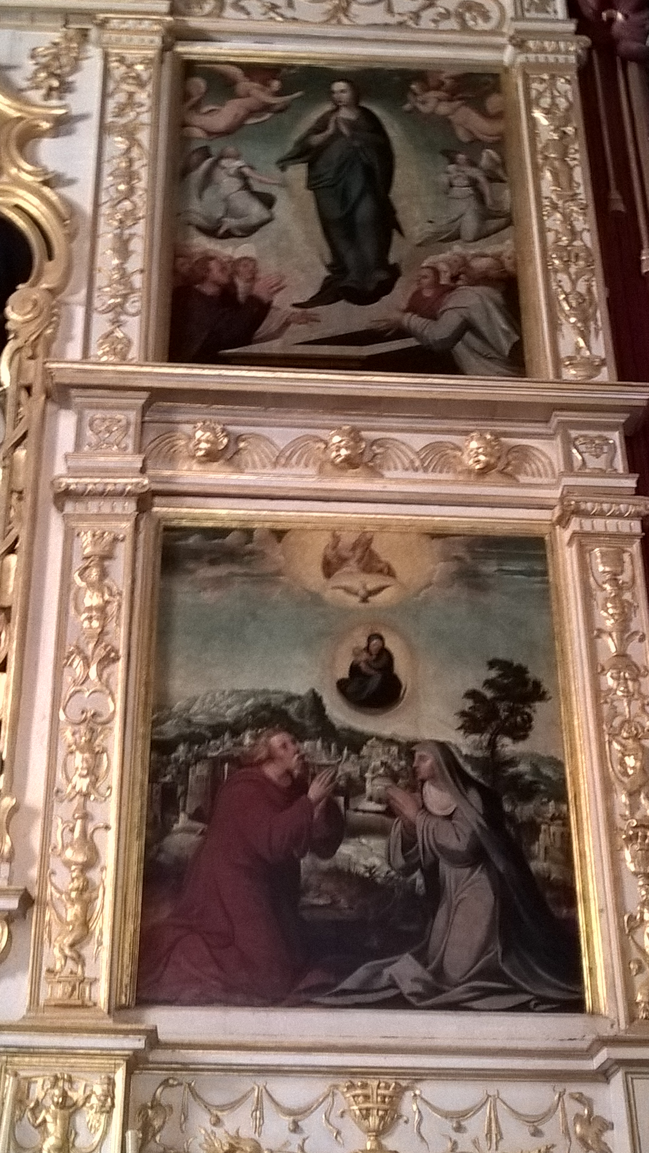 Assunção da Virgem e Encontro de S. Ana e S. Joaquim duas das pinturas do Retábulo do Altar-mor da Igreja Matriz da Ponta do Sol, ilha da Madeira